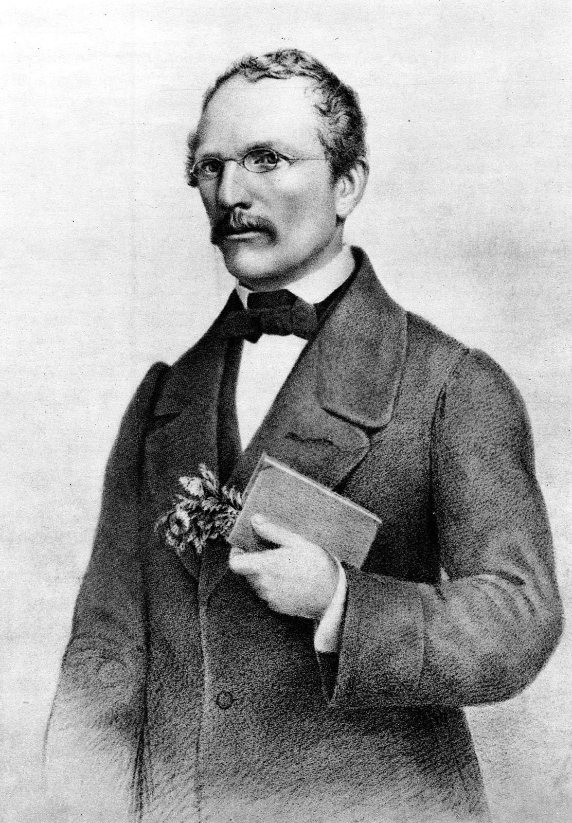 Karel Jaromír Erben (1811–1870); Litografie von Josef Farský